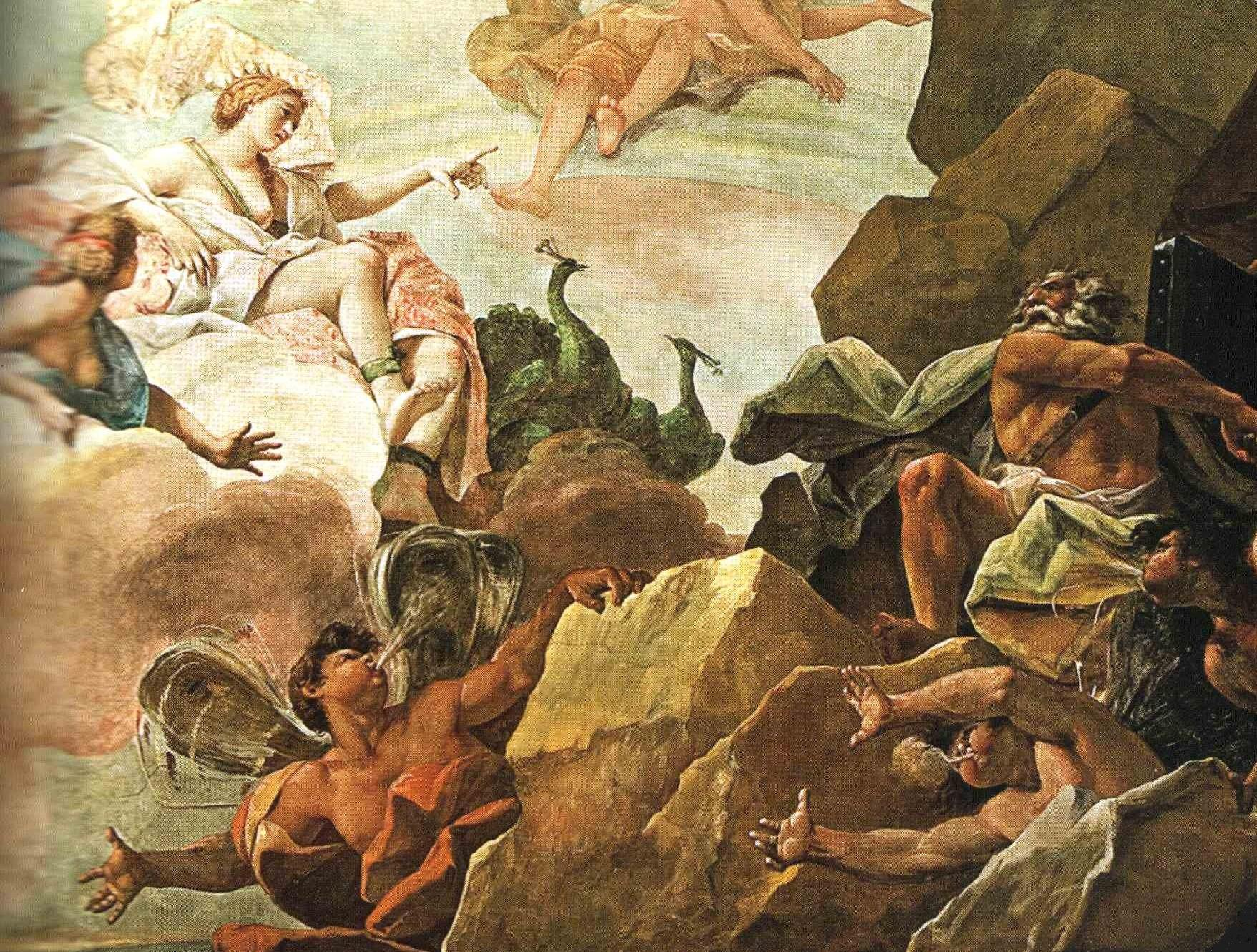 Giunone ordina a Eolo di liberare i Venti (particolare), affresco nel Palazzo Sanvitale di Parma.